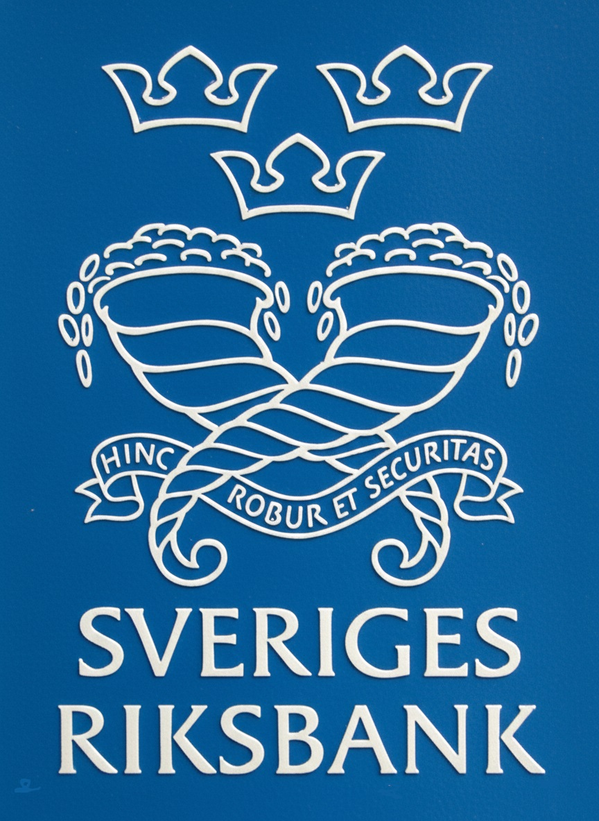 Riksbankshuset i Stockholm, entréskylt